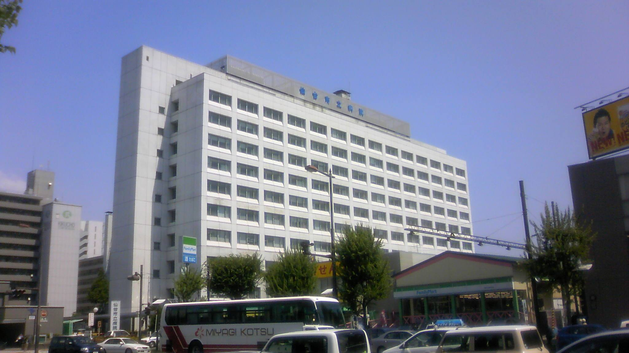 仙台市若林区清水小路に位置する仙台市立病院